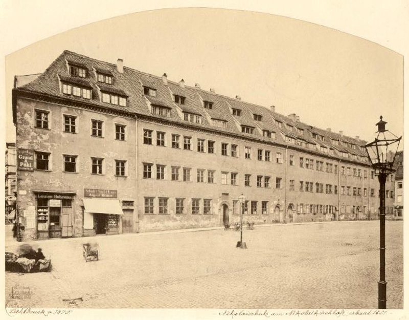 Die alte Nikolaischule in Leipzig 1875 (zweites Haus von links). Die rechten drei Häuser wurden 1876 für den Bau des Predigerhauses abgerissen.